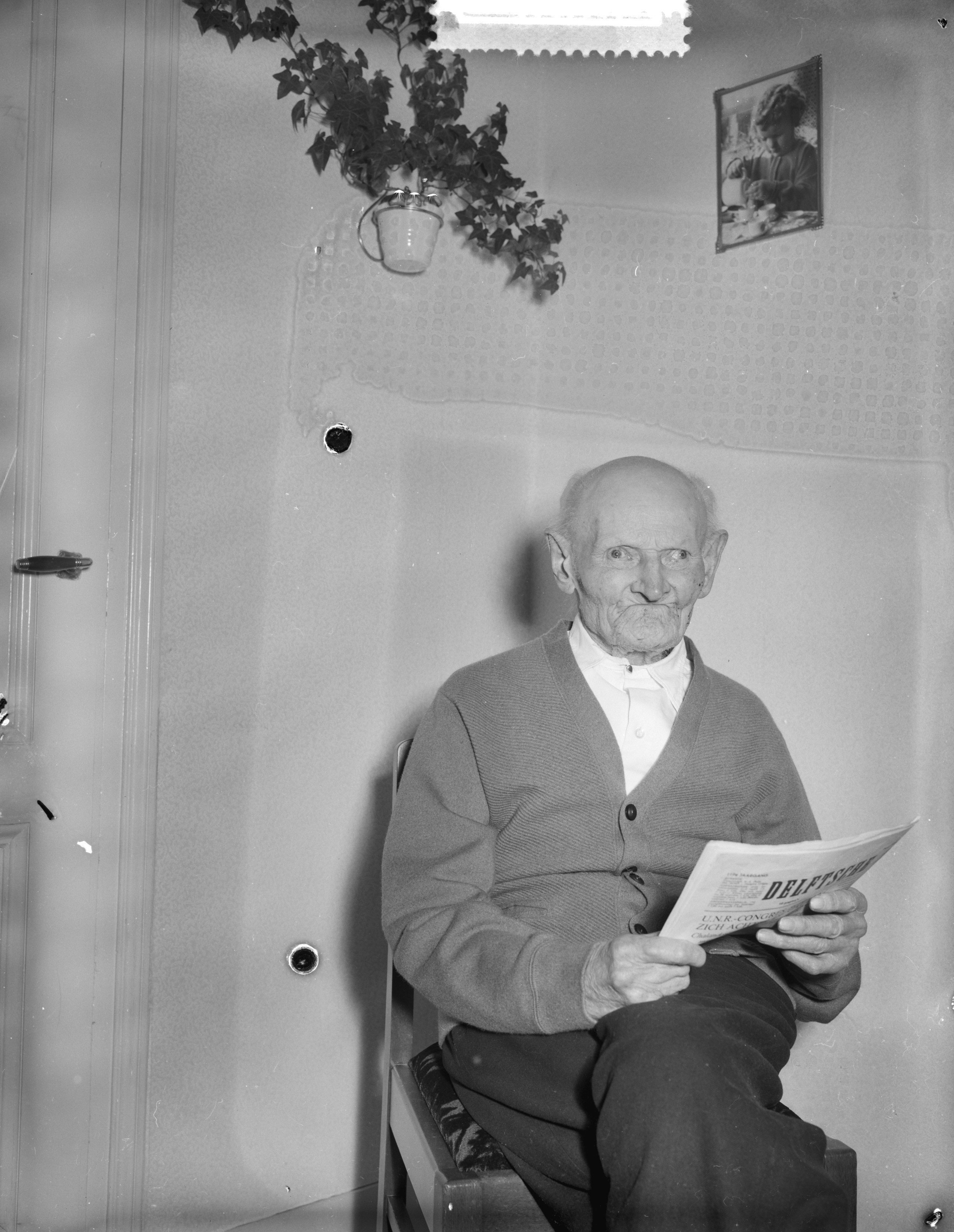 Collectie / Archief : Fotocollectie Anefo Reportage / Serie : [ onbekend ] Beschrijving : Opa Kostering Delft 108 jaar, oudste inwoner Nederland Datum : 18 november 1959 Locatie : Delft, Zuid-Holland Fotograaf : Fotograaf Onbekend / Anefo Auteursrechthebbende : Nationaal Archief Materiaalsoort : Negatief (zwart/wit) Nummer archiefinventaris : bekijk toegang 2.24.01.04 Bestanddeelnummer : 910-8329